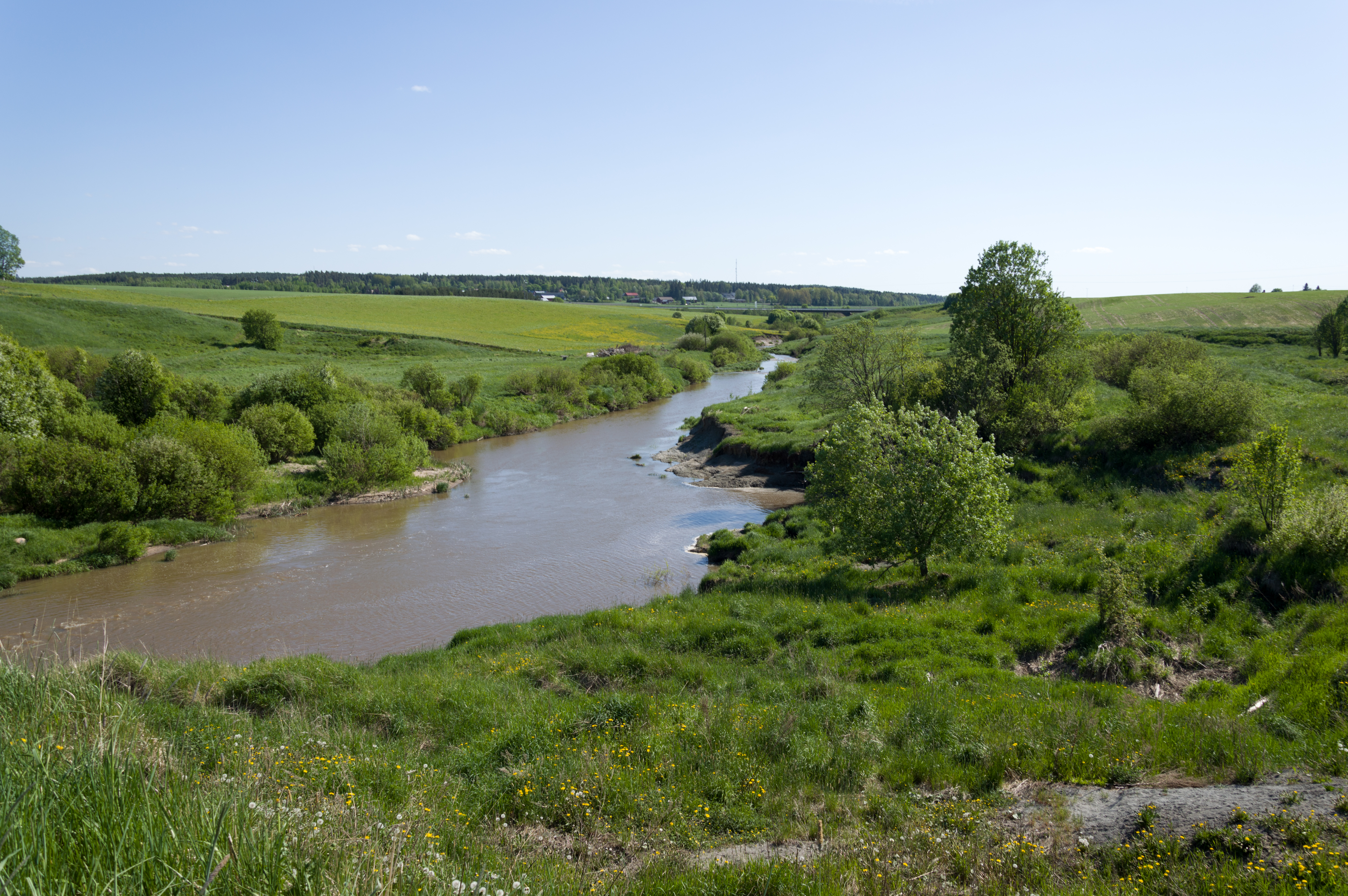 Uskelanjoki Salossa